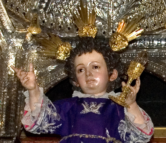 Escultura de Niño Jesús, (1606-1607), autor: Juan Martínez Montañés, Iglesia del Sagrario de Sevilla